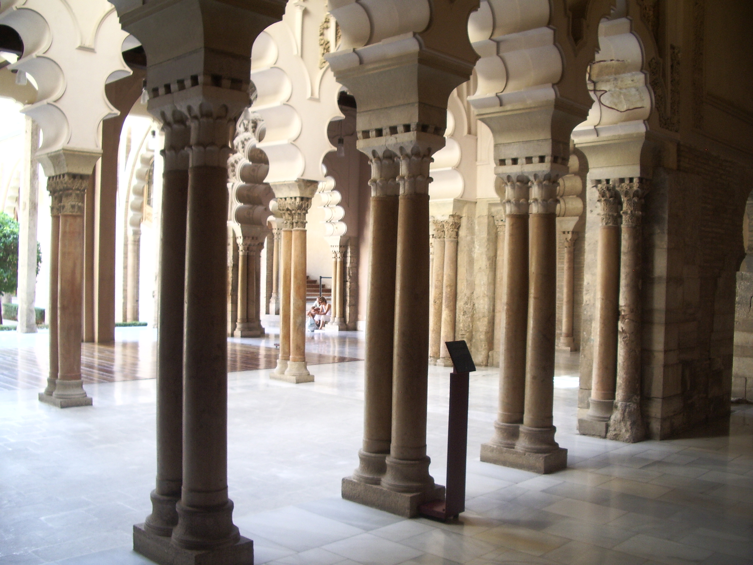 Columnatas de la Aljafería